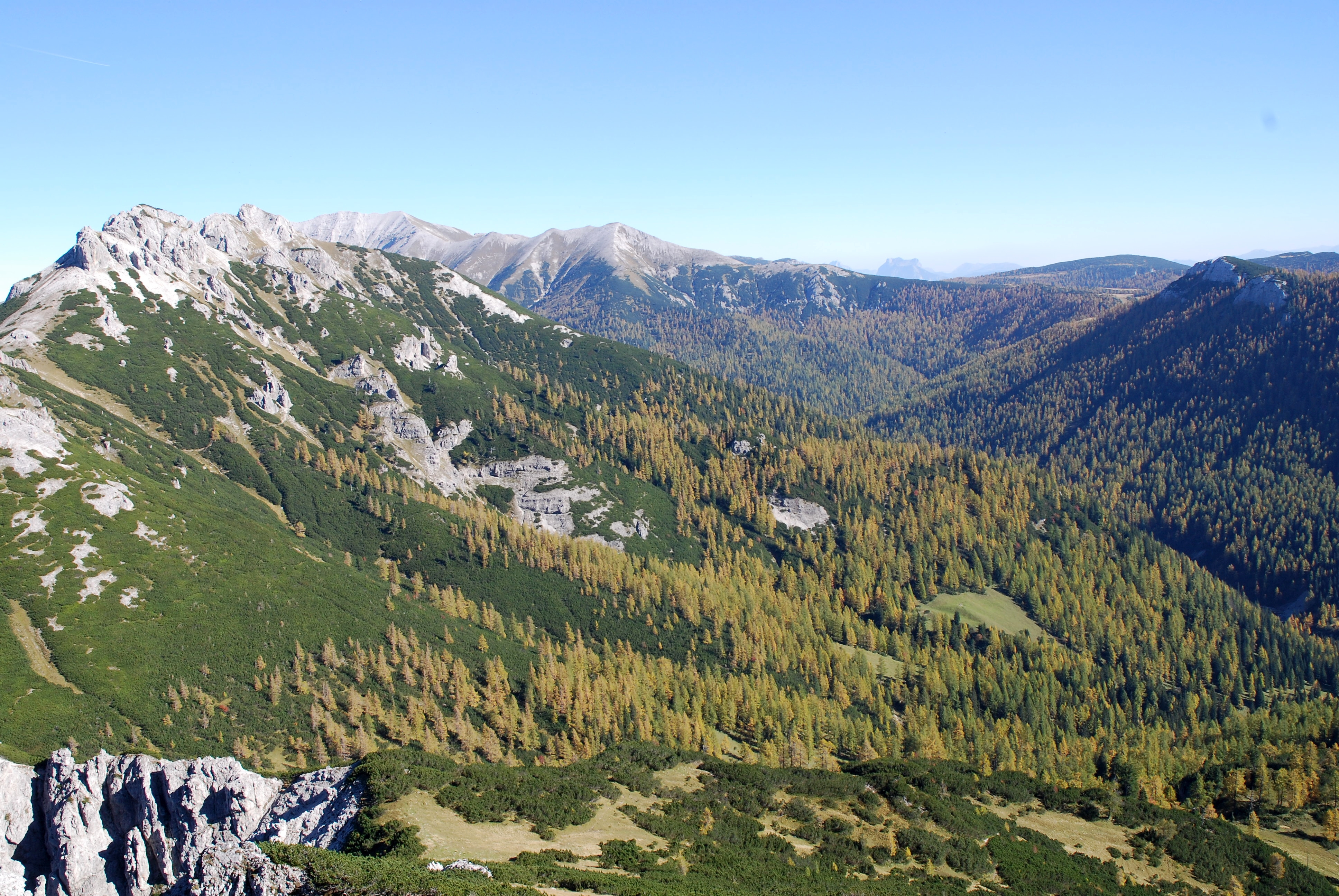 Blick vom Almkogel nach Osten auf Hirscheck, Hochmölbing und Sumpereck, Totes Gebirge, Österreich